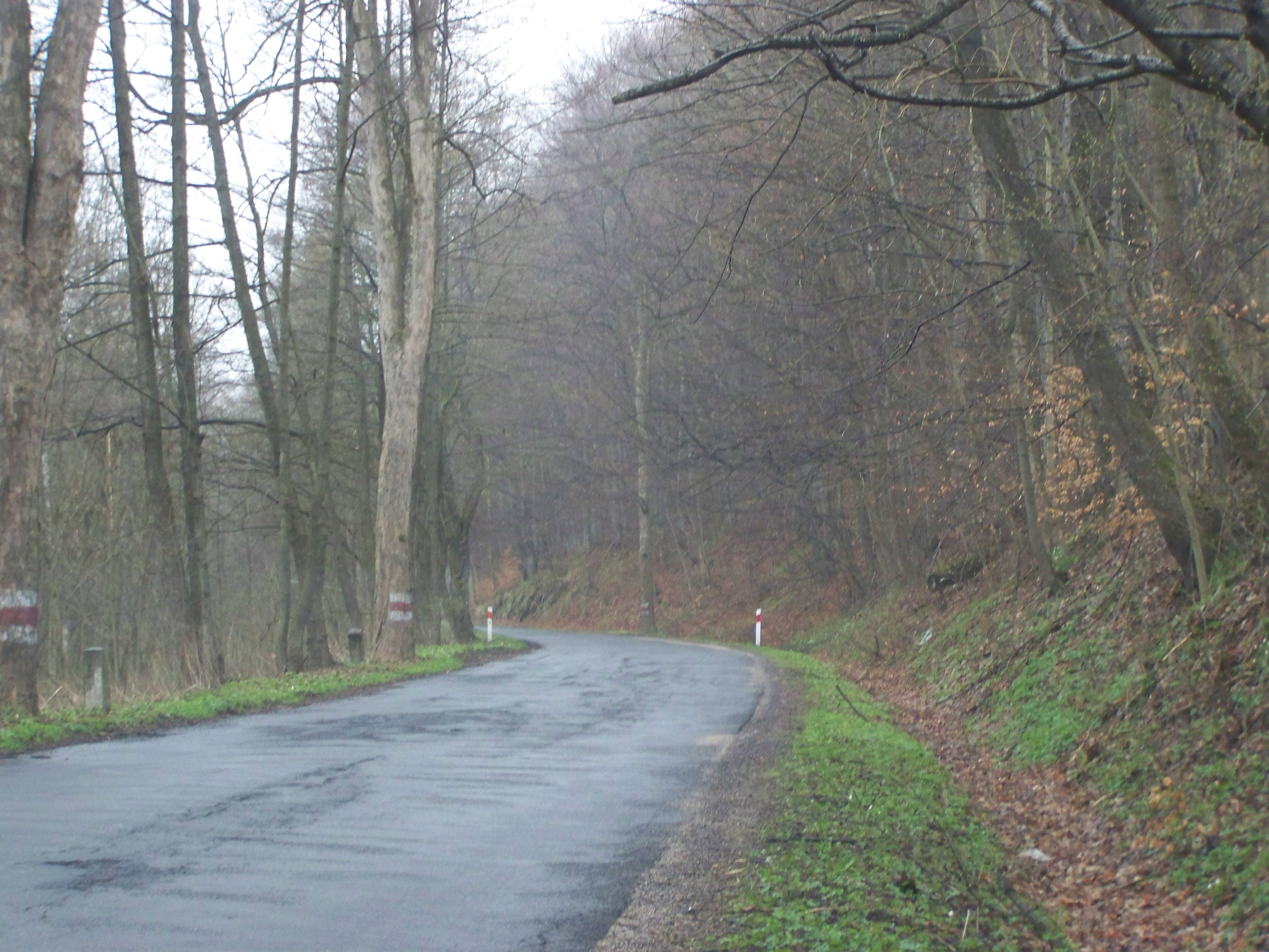 Droga wojewódzka nr390